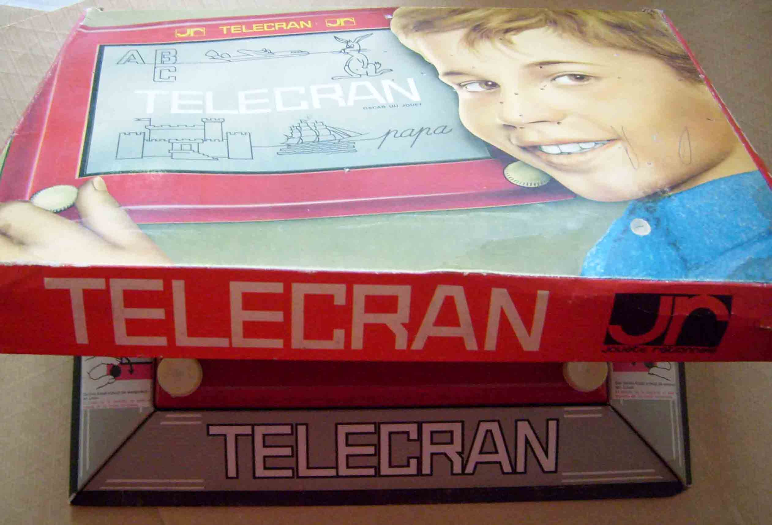 Boîte du Télécran, un jouet commercialisé par la société française Les Jouets Rationnels dans les années 60.